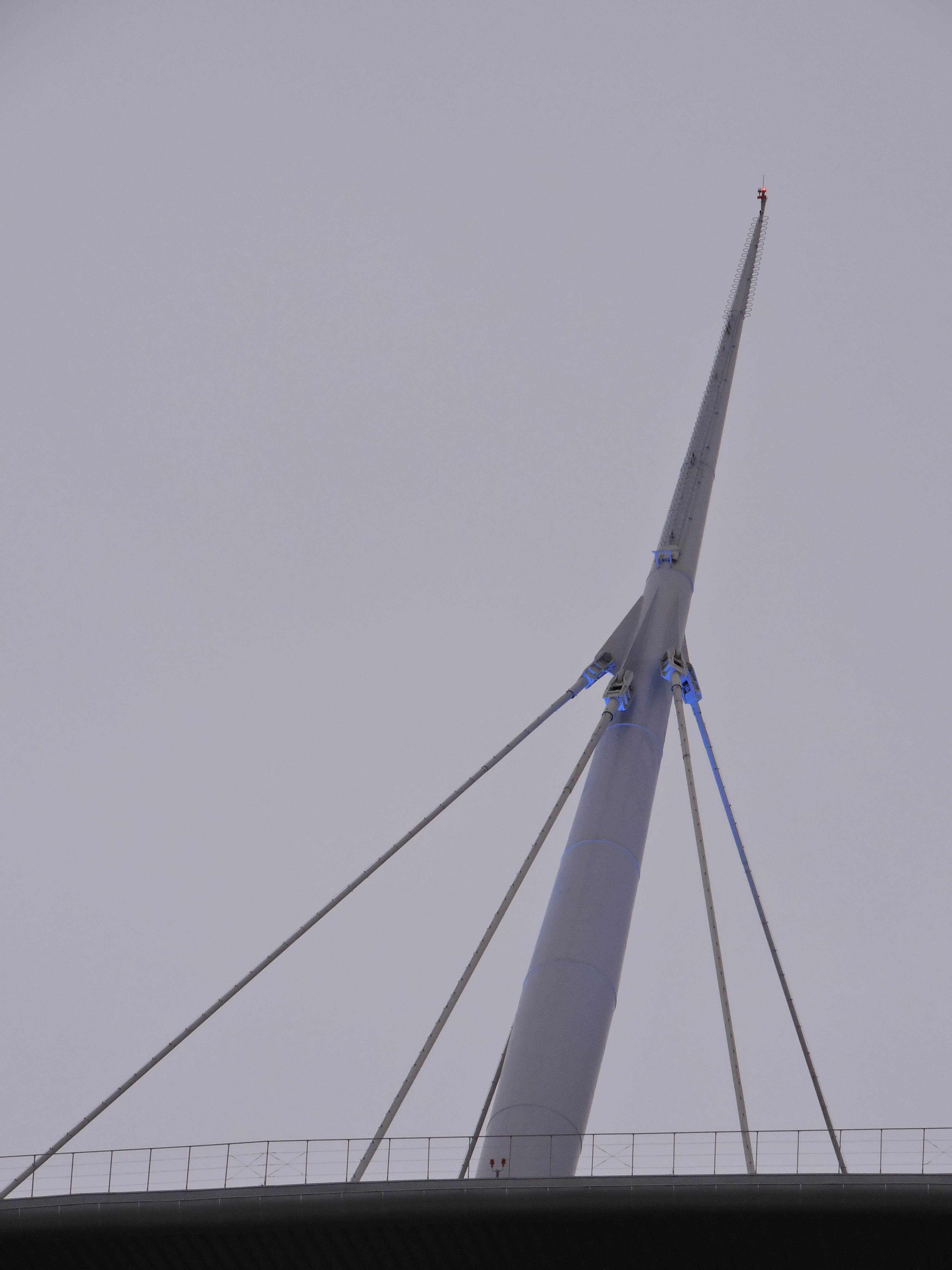 Пилон стадиона "Зенит-Арена" в Петербурге. Всего их 8 штук